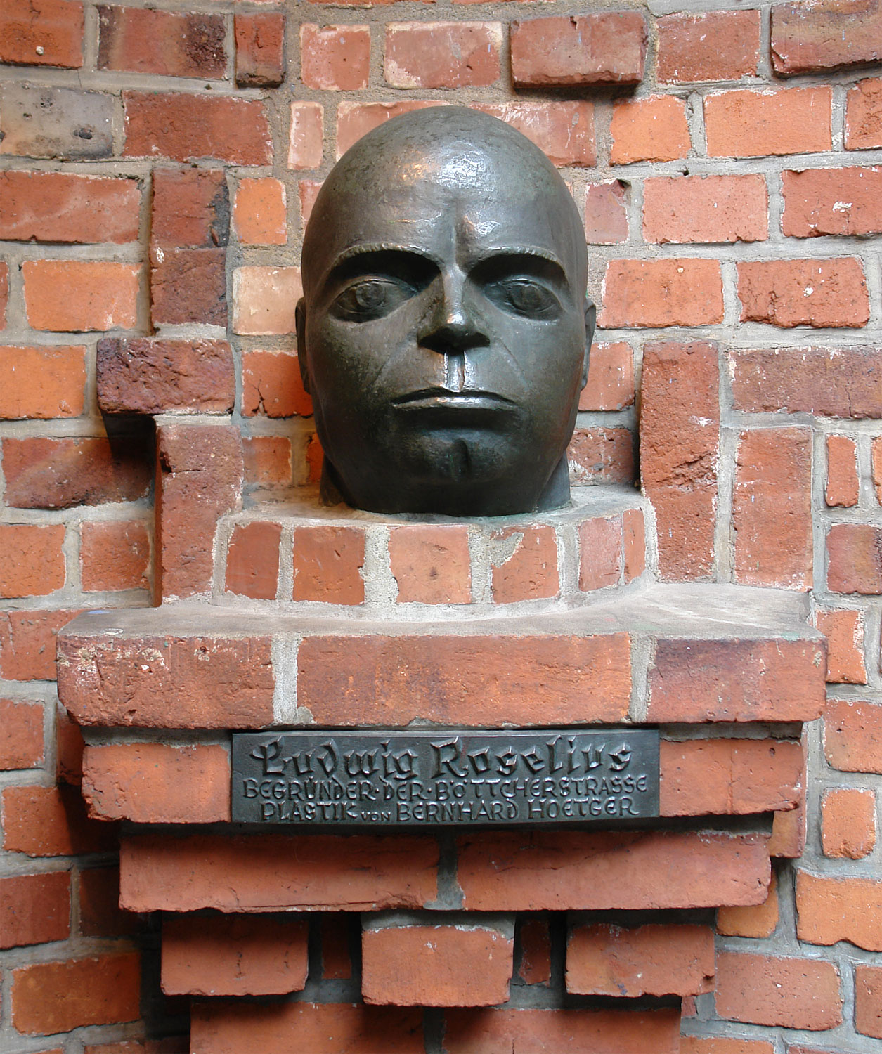 Bernhard Hoetger: Kopf Ludwig Roselius (1922, Bronze). Standort: Handwerker-Hof in der Bremer Böttcherstraße Das abgebildete Objekt ist ein geschütztes Kulturdenkmal in der Freien Hansestadt Bremen, mit der Nr. 1503,T004 beim Landesamt für Denkmalpflege registriert.